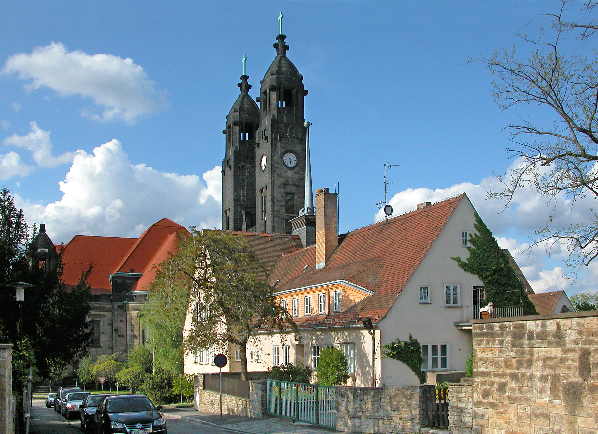 01.05.2008 01219 Dresden-Strehlen: Evangelisches Gemeindezentrum der Christuskirche, Elsa-Brandström-Str. 1 (GMP: 51.026818,13.765498). Erbaut 1935-37 nach Plänen von Heinz Arnold Götze. [DSCN32636.TIF]20080501250DR.JPG(c)Blobelt